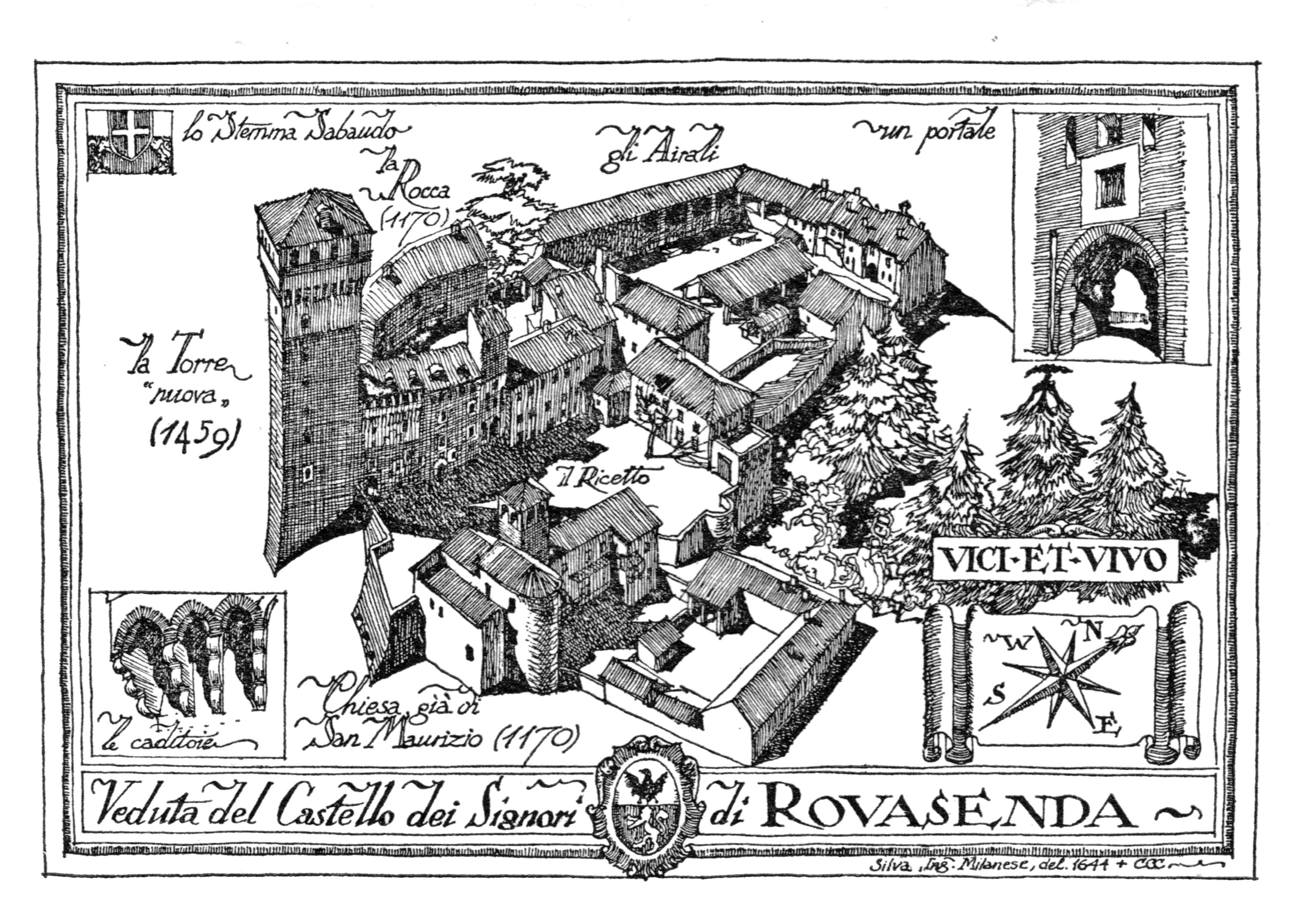 Lithographie der Burg Rovasenda von Paolo Caccia Dominioni.